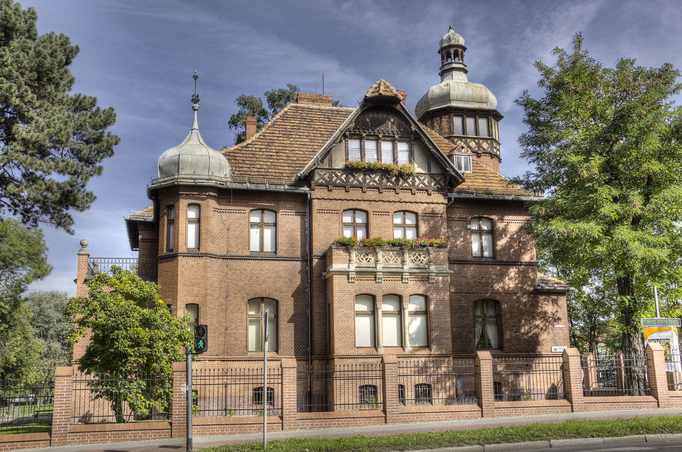 Dzierżoniów, Świdnicka 30 - willa, 1897